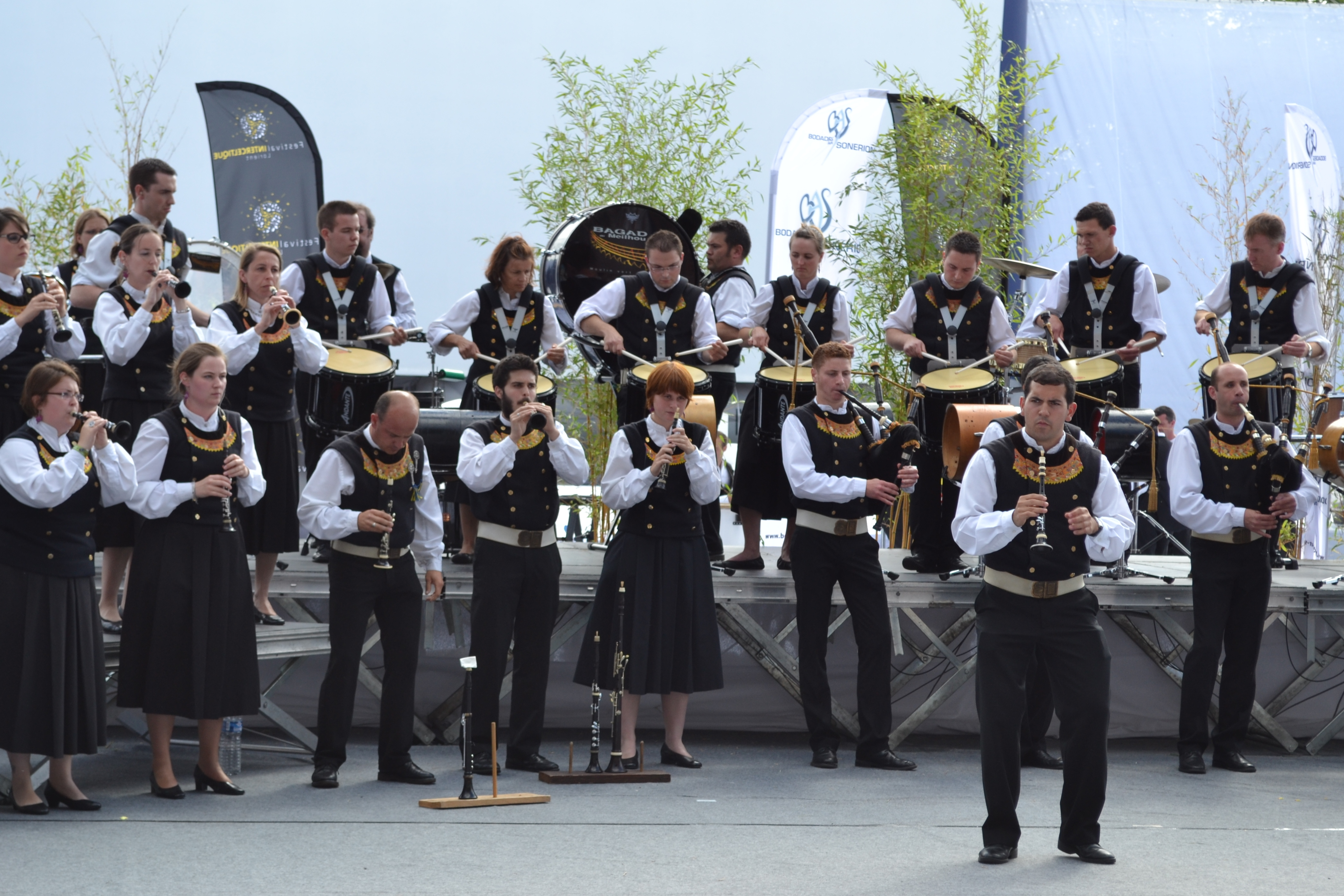 Le bagad ar Meilhoù Glaz (Quimper) sur scène au stade du Moustoir pour le championnat 1re catégorie, lors du Festival interceltique de Lorient 2012 (Morbihan, Bretagne).